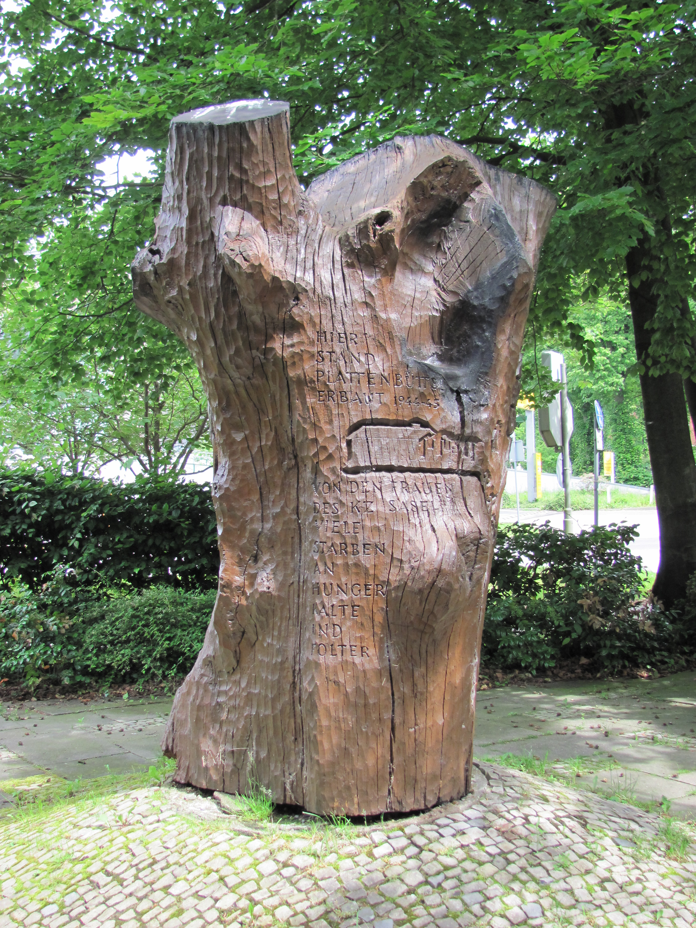 Denkmal an der Gedenkstätte Plattenhaus Poppenbüttel, Hamburg. This is a photograph of an architectural monument.